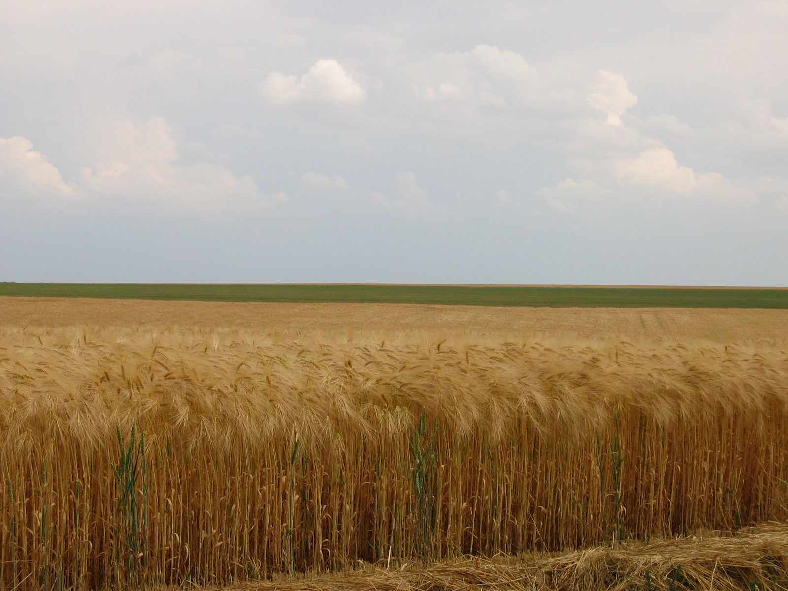 champ d'orge, paysage rural de la Beauce, entre Dreux et Chartres, Eure-et-Loir, France